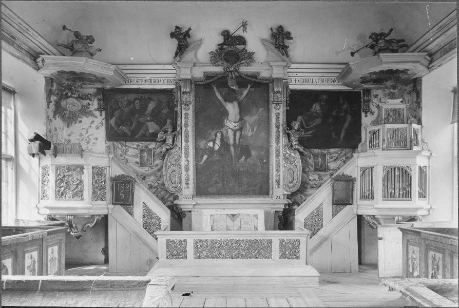 Interiör mot nord: Koret. Predikstol, altaruppsats, orgel. Kategori: (02) InteriörerInteriör mot nord: Koret. Predikstol, altaruppsats, orgel.